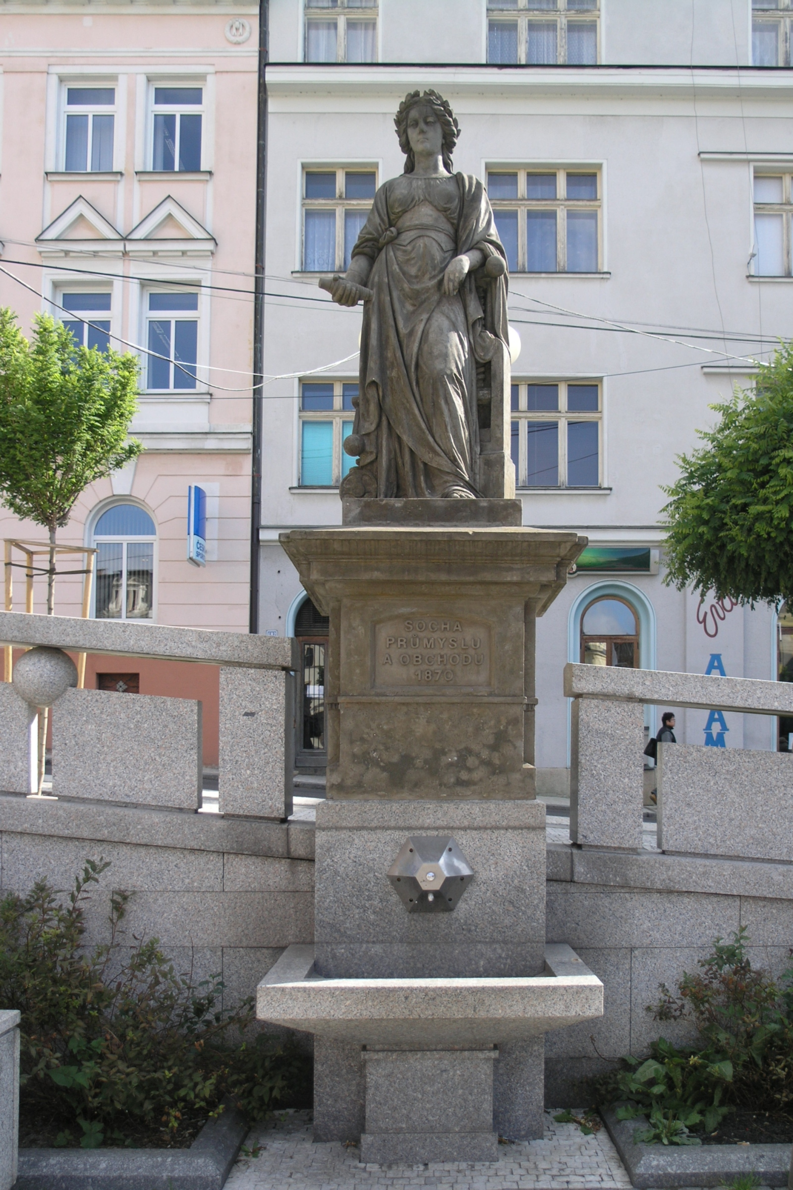 Česká republika, Jablonec nad Nisou - socha průmyslu a obchodu (z roku 1870) na Mírovém náměstí